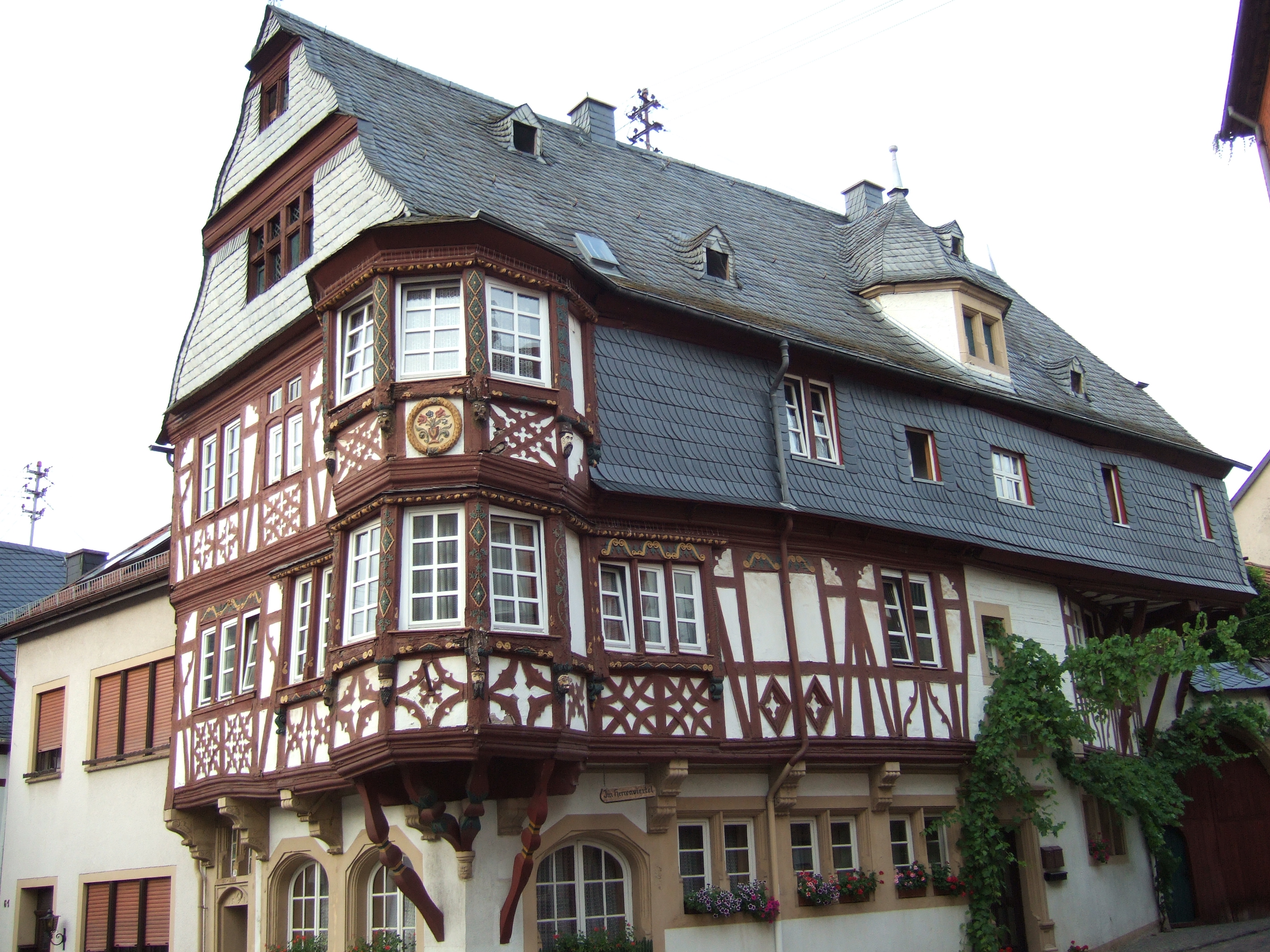 Alt'sches Haus, Monzingen